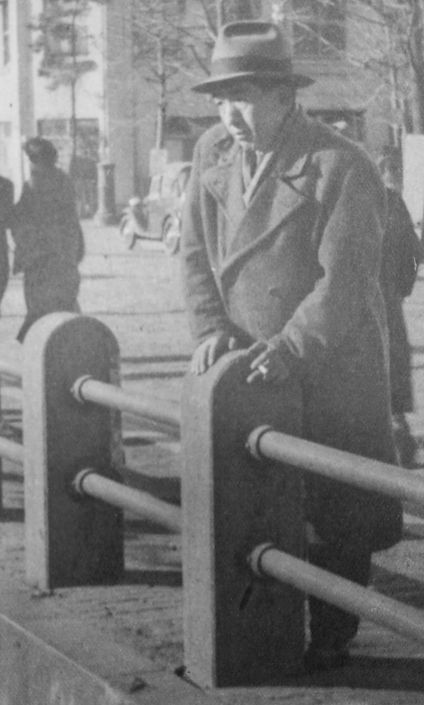 奥野椰子夫（作詞家）